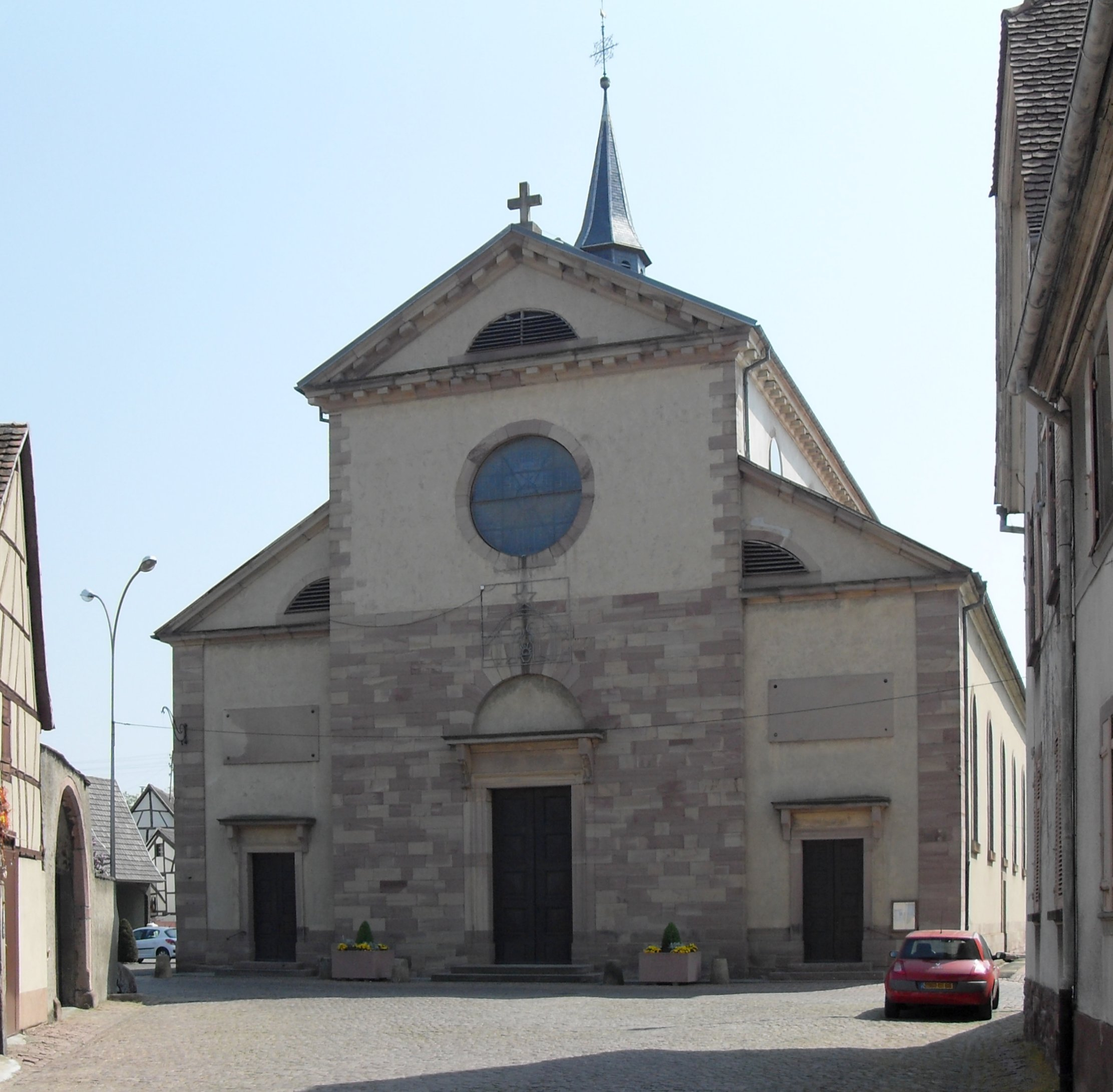 L'église Saint-Barthélemy à Sainte-Croix-en-Plaine, côté ouest